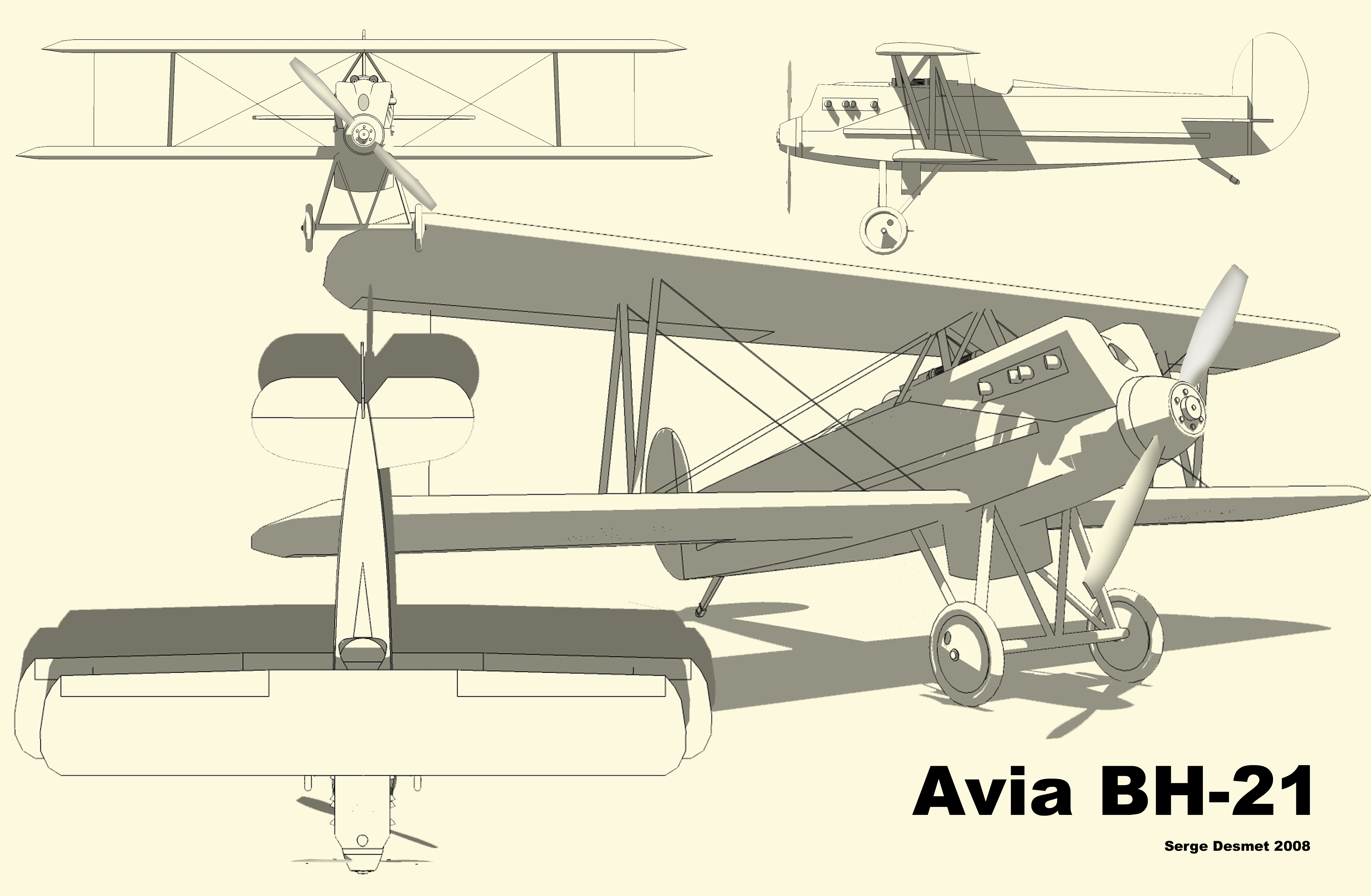 Plan 3 vues del'Avia BH-21